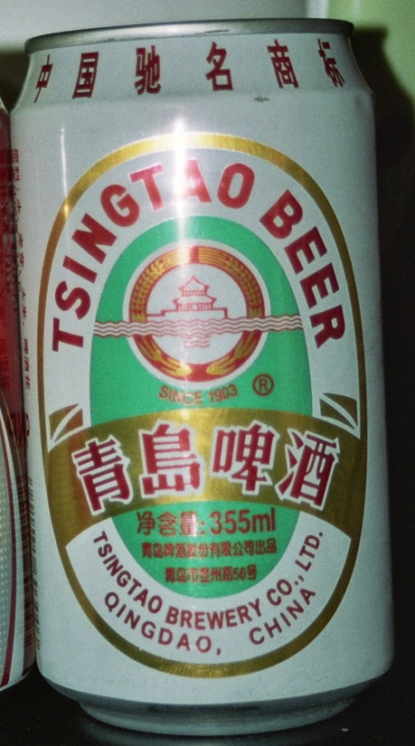 Eine Büchse Tsingtao Bier